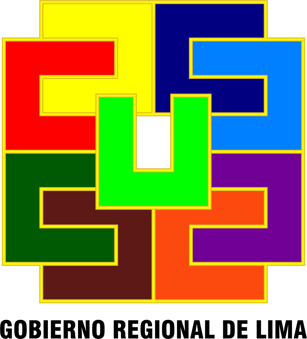 Región Lima